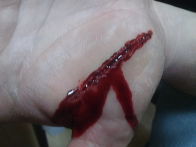 Veštačka posekotina dlana